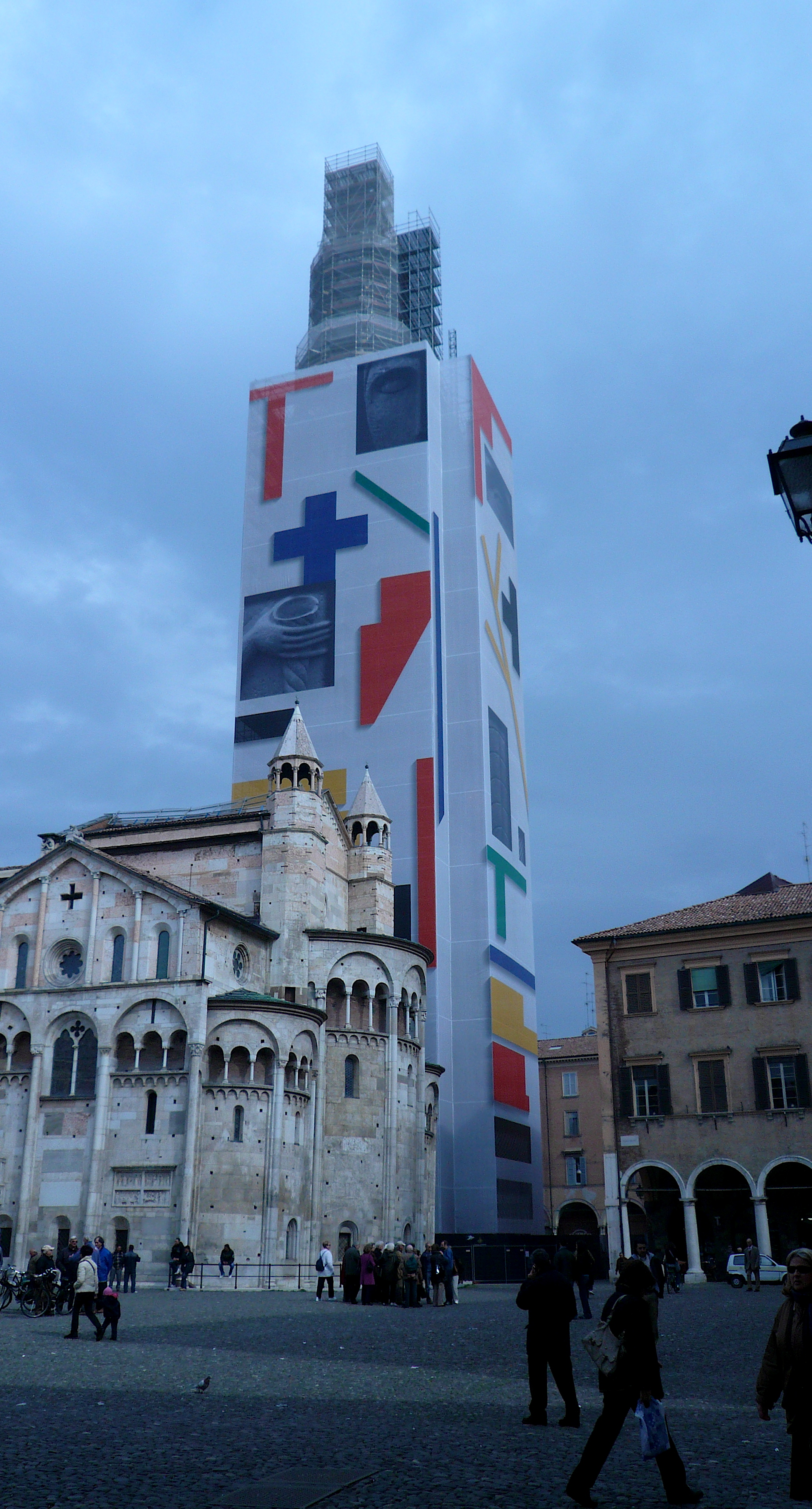 Torre Ghirlandina This is a photo of a monument which is part of cultural heritage of Italy.